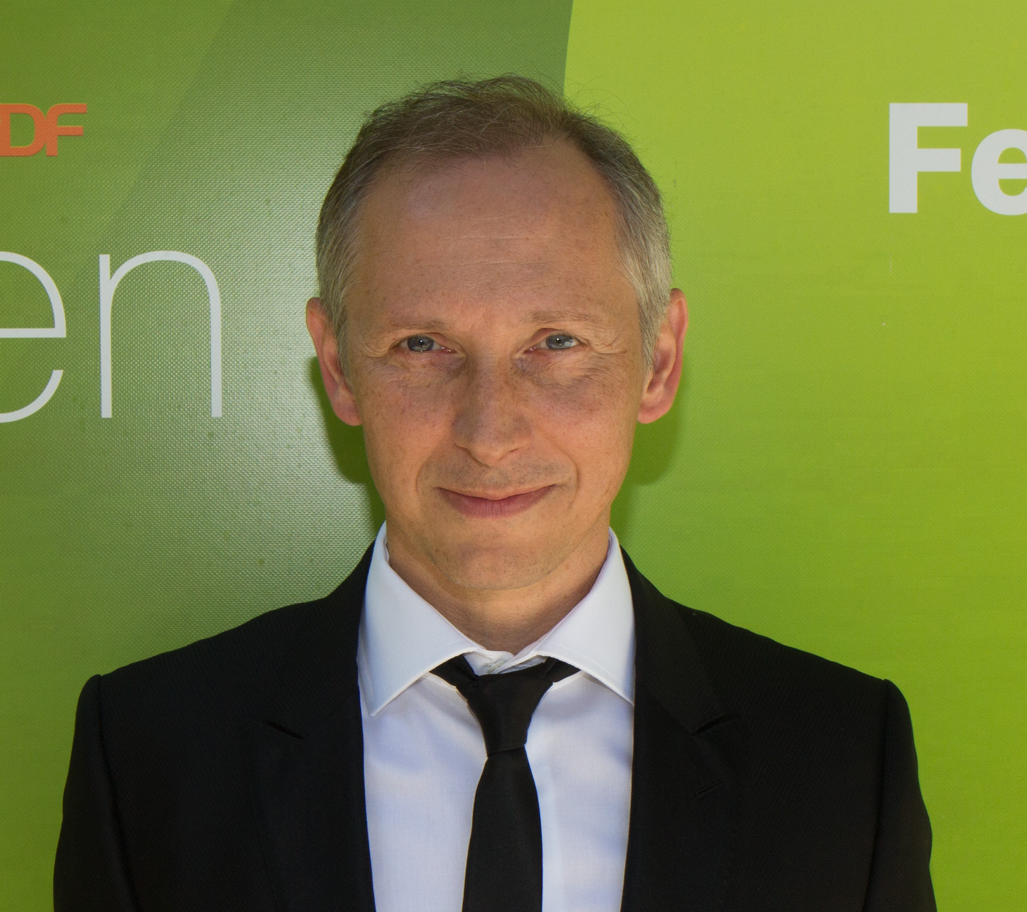 Helmut Lotti als Gast im ZDF-Fernsehgarten am 19. August 2018 in Mainz.